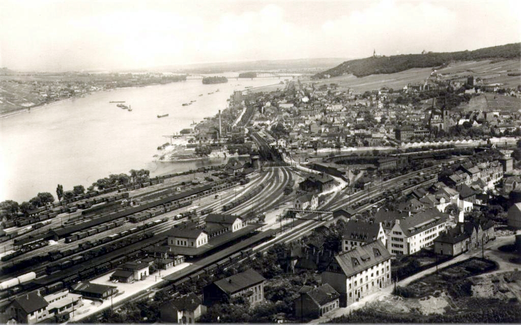 Bingen und das Bahngelaende Bingerbrueck.